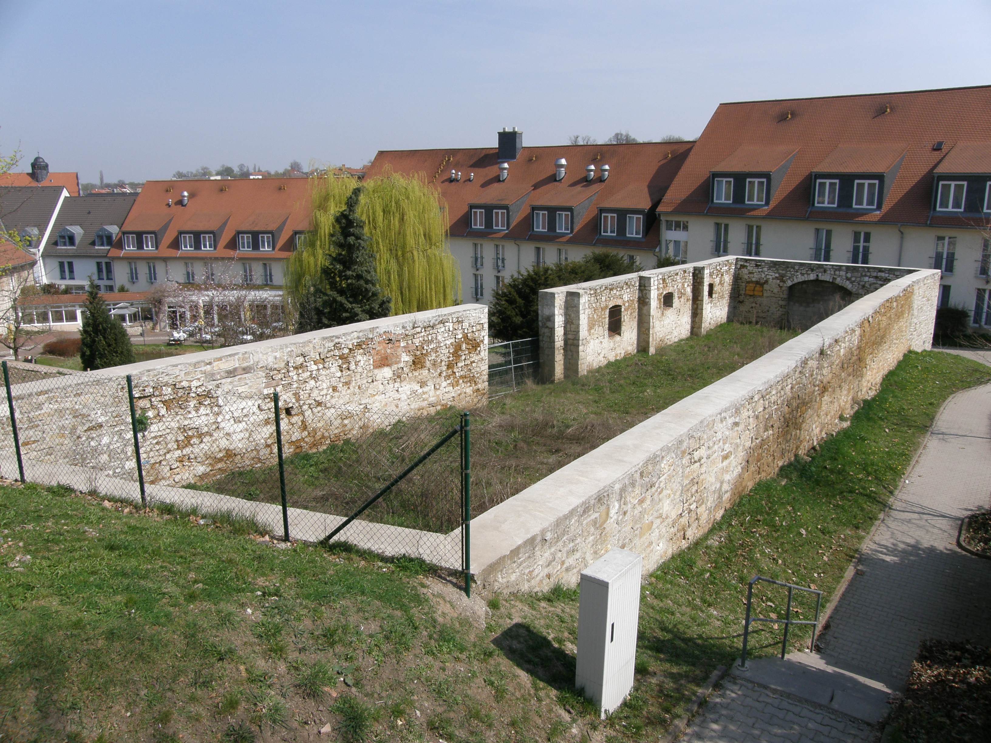 Stadt Apolda - Schloss, Mauerreste am Parkplatz